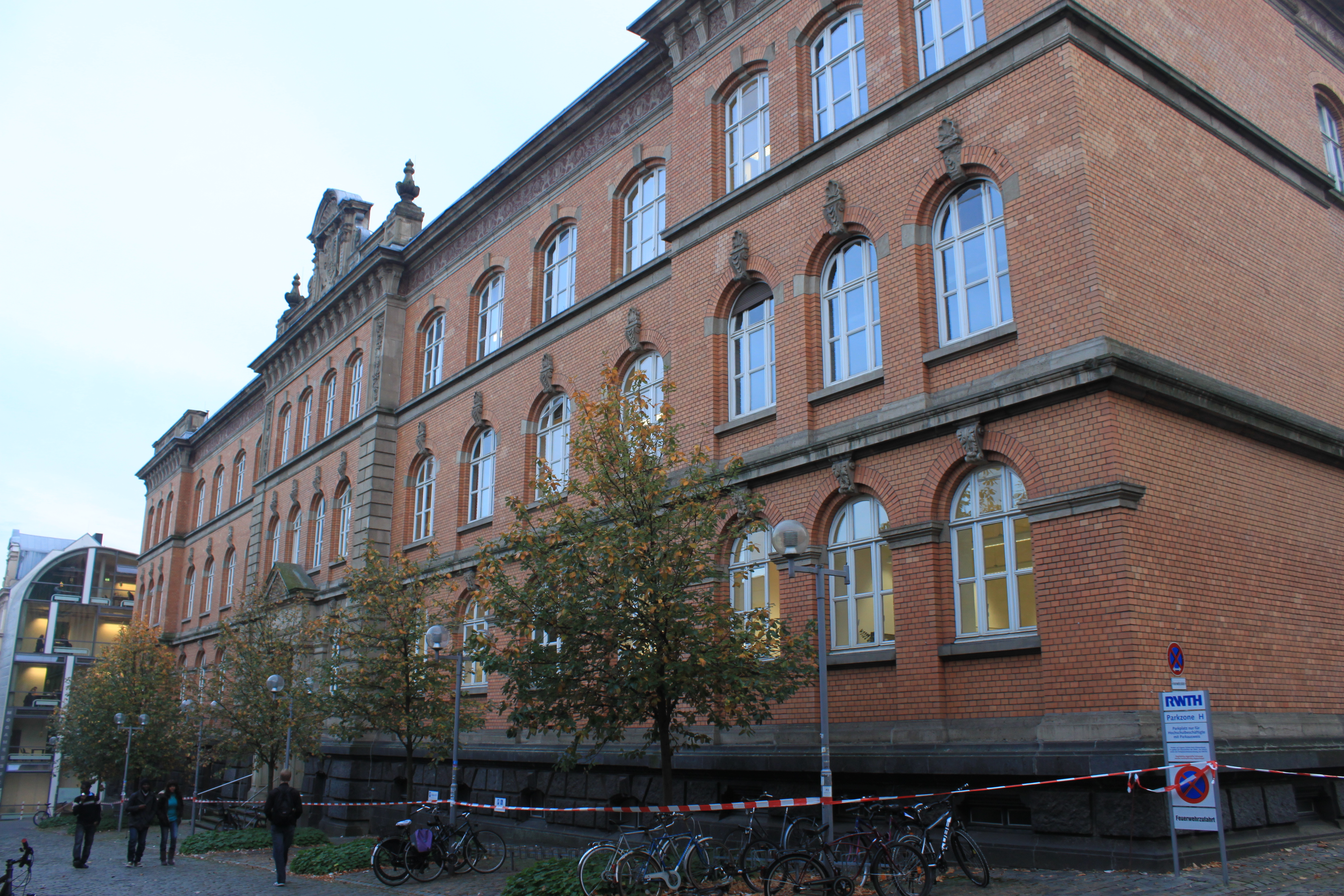 Aachen - Kármánstraße 19 - Philosophische Fakultät